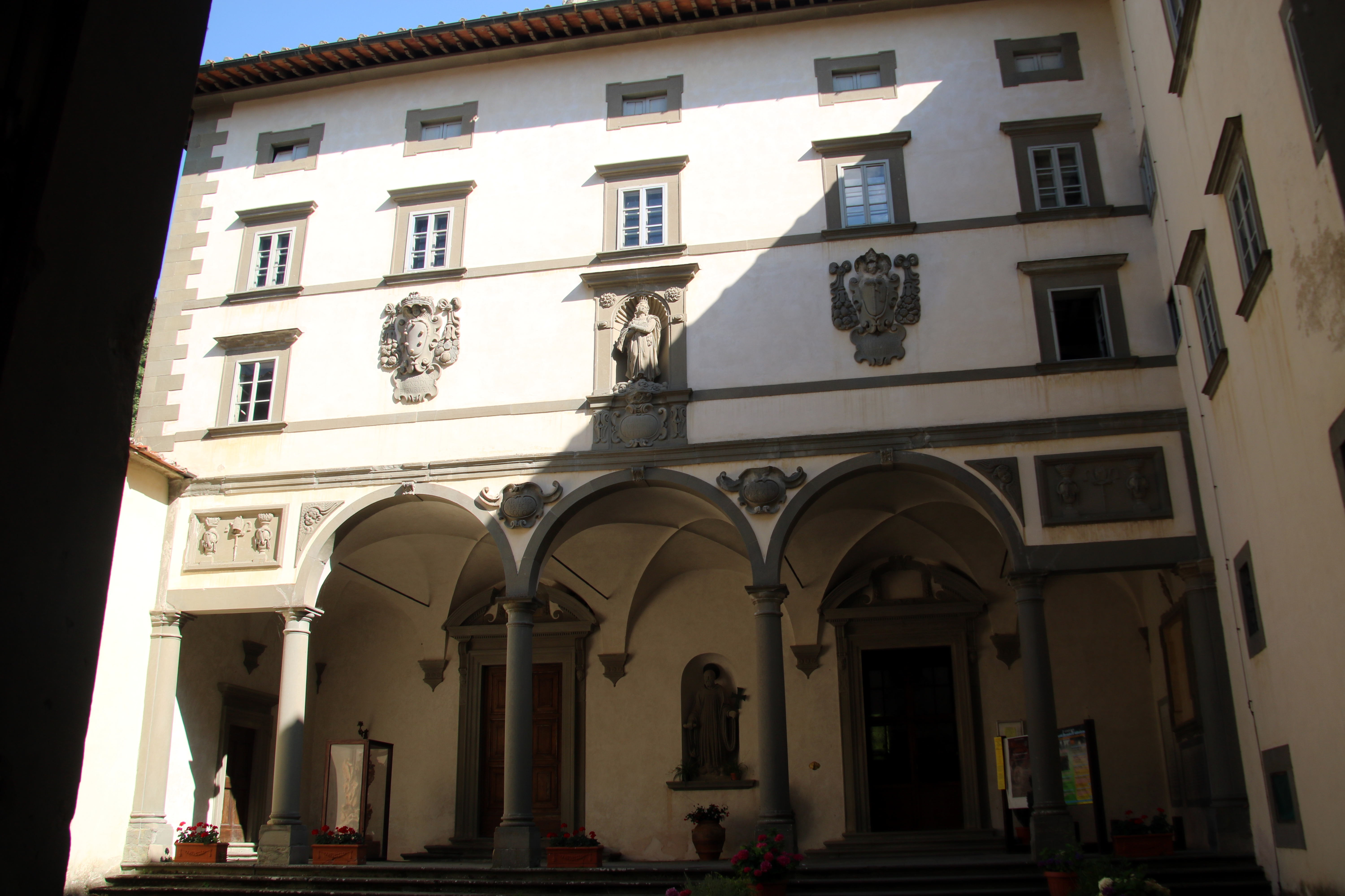 Via Ghibellina, Reggello, Vallombrosa, Abbazia di Vallombrosa